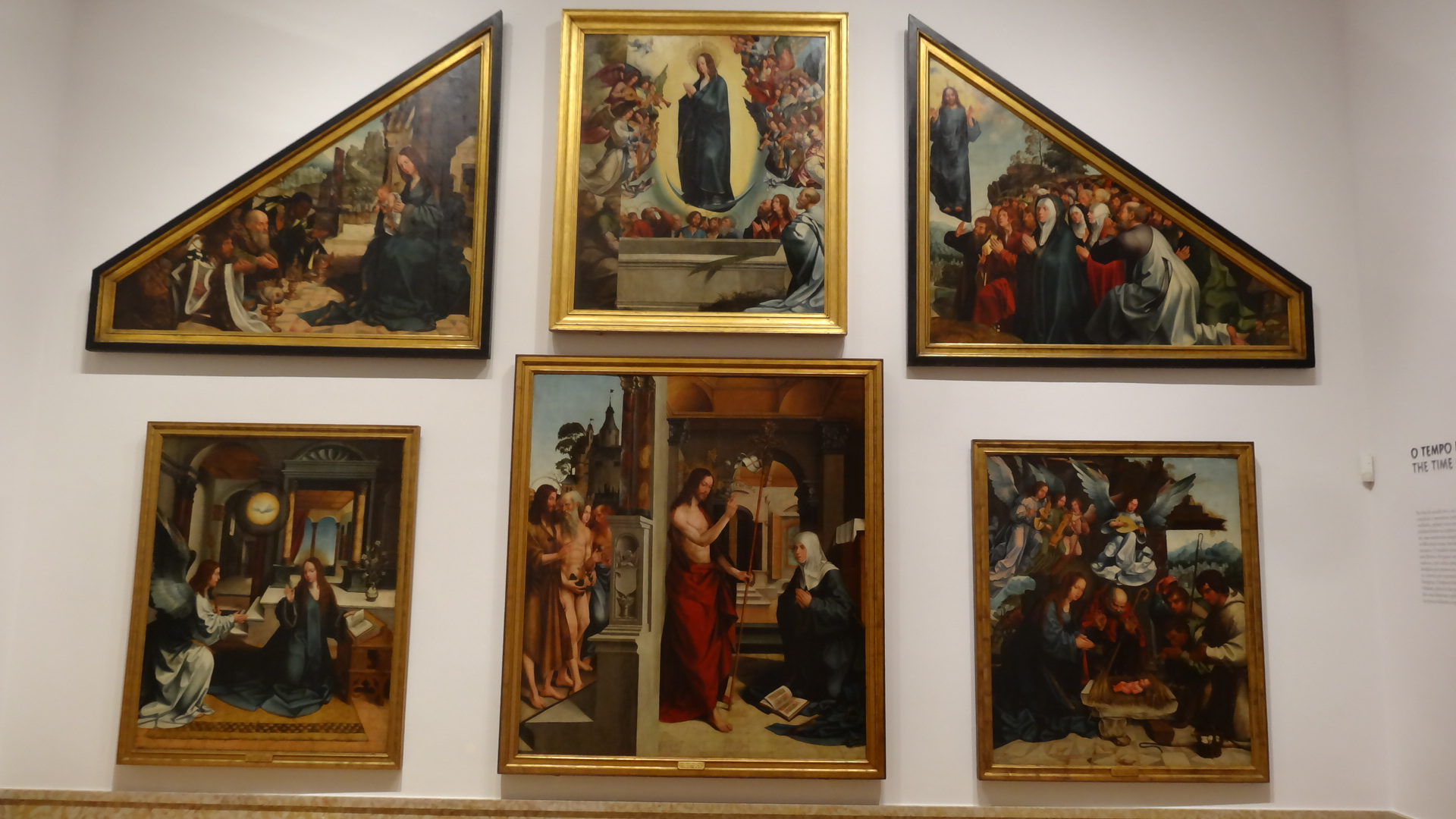 O Políptico do Convento da Madre de Deus é um conjunto de pinturas a óleo sobre madeira pintadas em 1515 na oficina de Jorge Afonso, das quais se encontram actualmente no Museu Nacional de Arte Antiga, em Lisboa, as que se vêem na imagem.